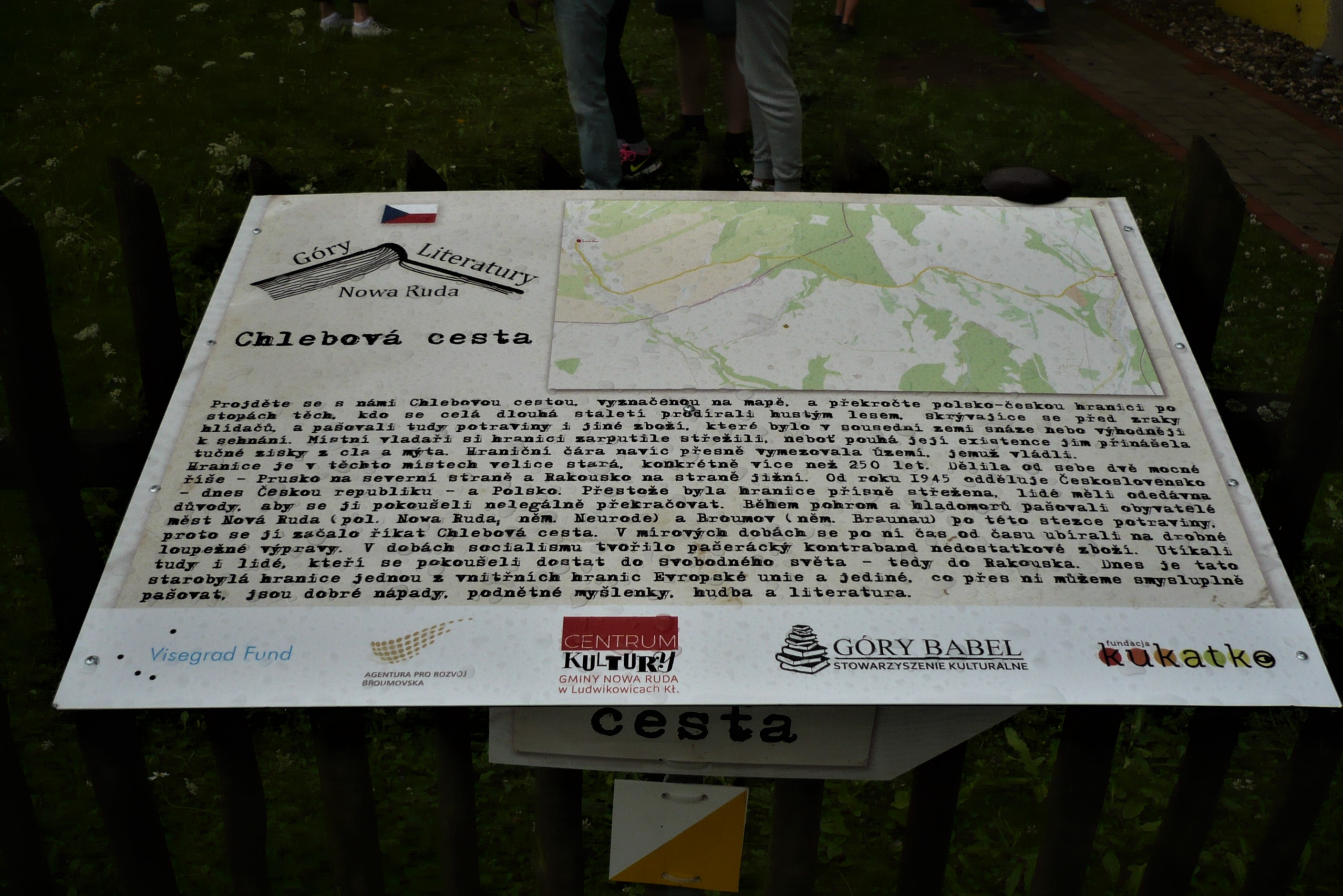 Tablica na Drodze Chlebowej Sonov - Włodowice